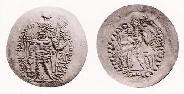 Varahran I